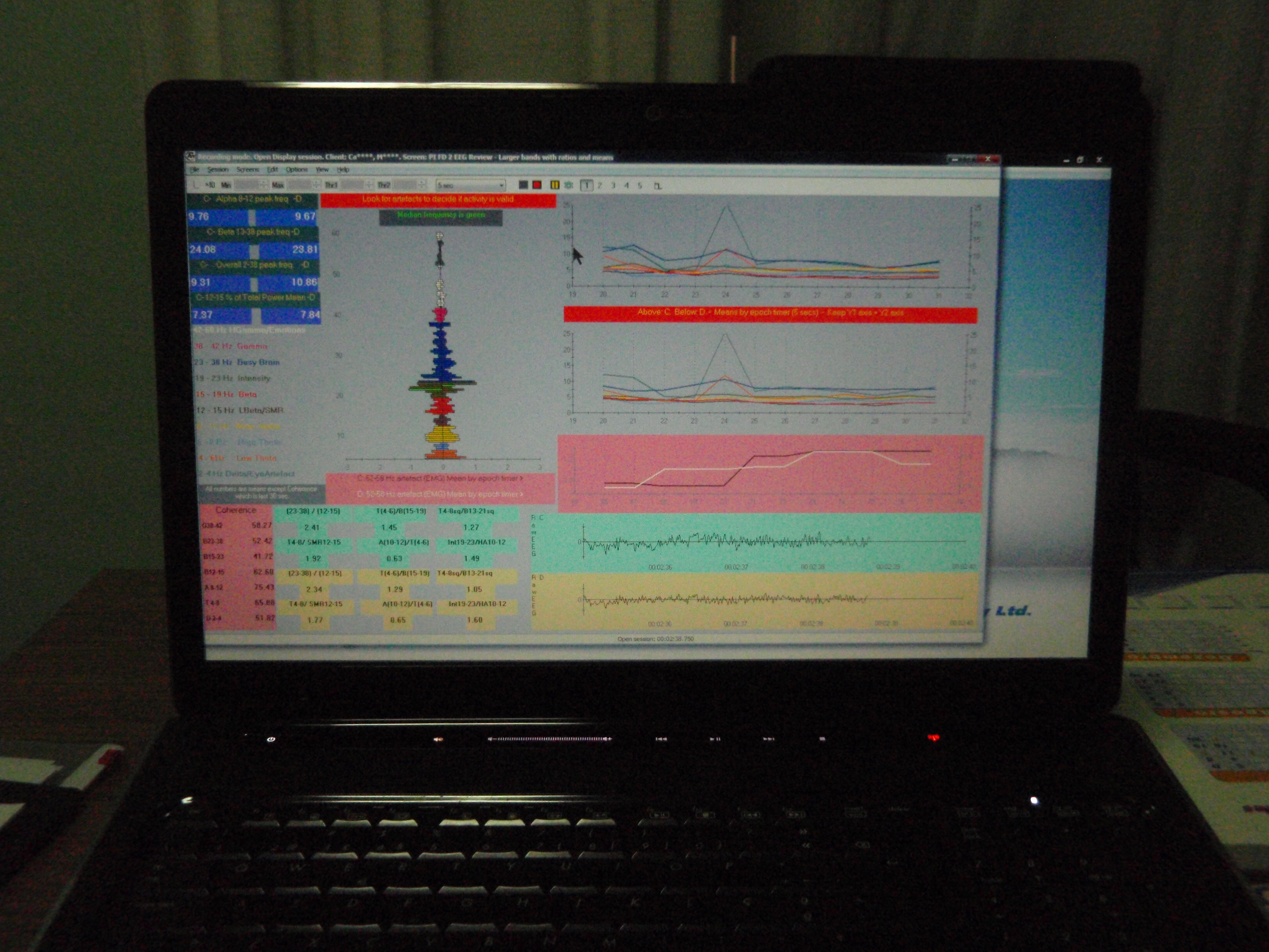 Computador exibindo software com dados do neurofeedback do paciente.